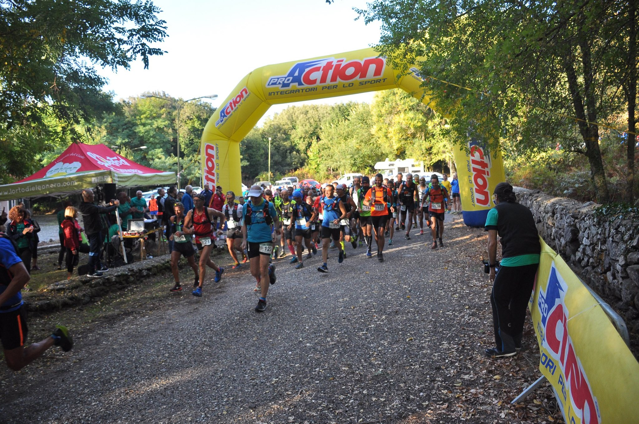 pARTENZA sum